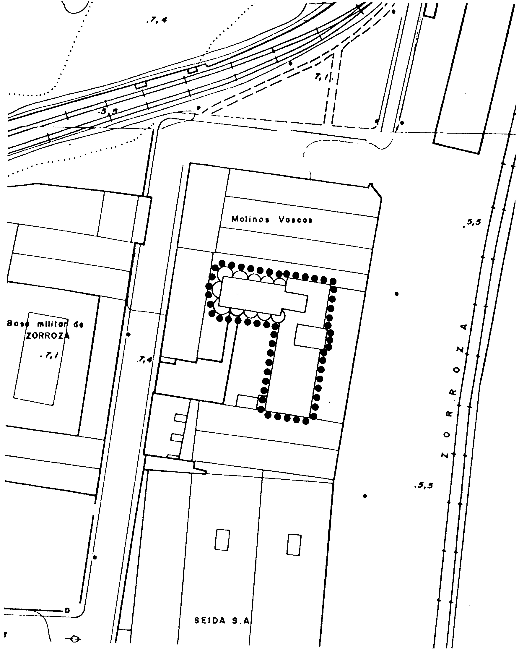 Zorrotzako Molinos Vascos irin-lantegiaren kokapen-planoa.